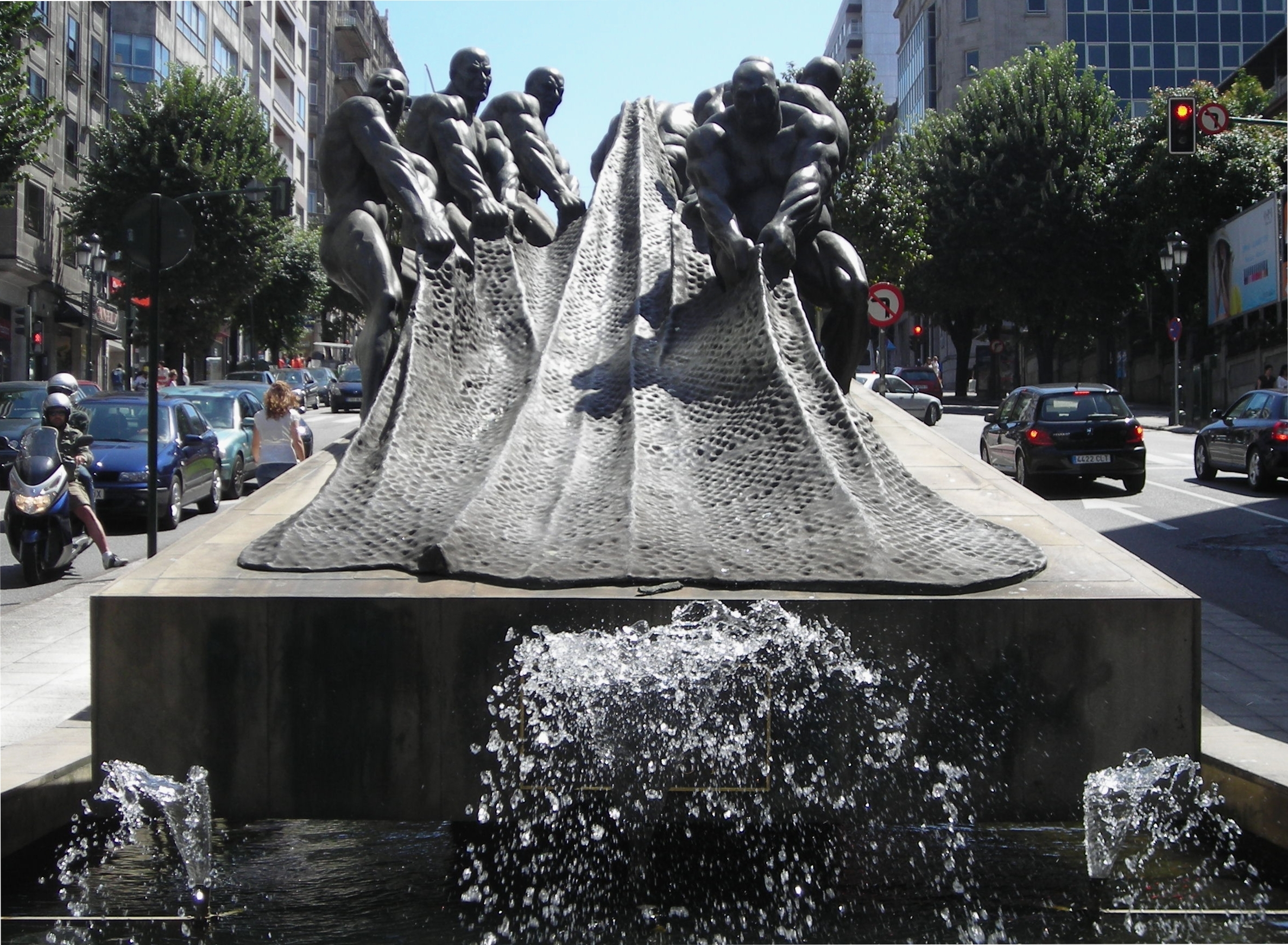 Os Redeiros en Vigo, monumento ó traballo, obra de Ramón Conde Bermúdez.